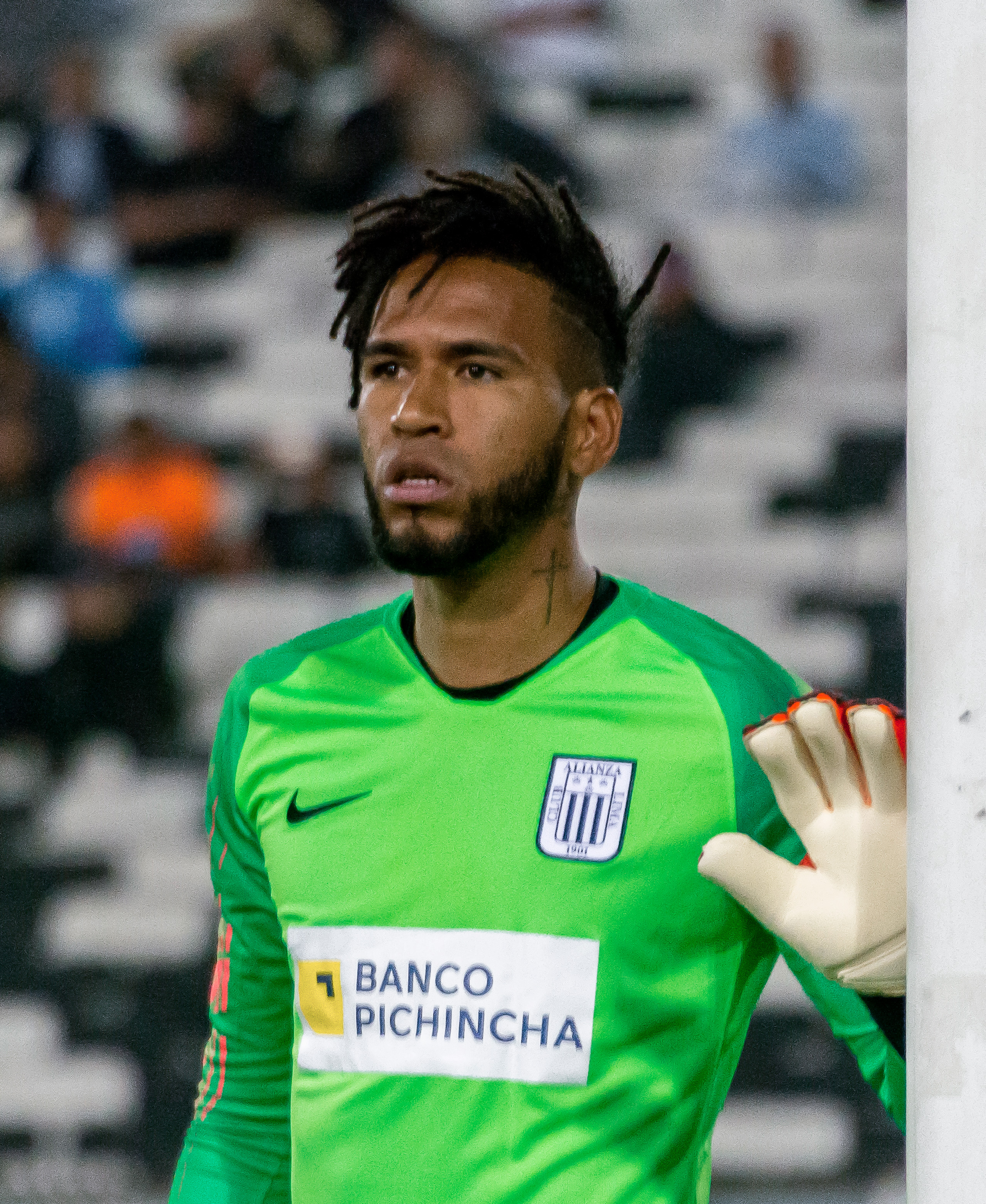 Pedro Gallese, Palestino vs Alianza Lima, Estadio Monumental, Macul, Santiago, Chile.